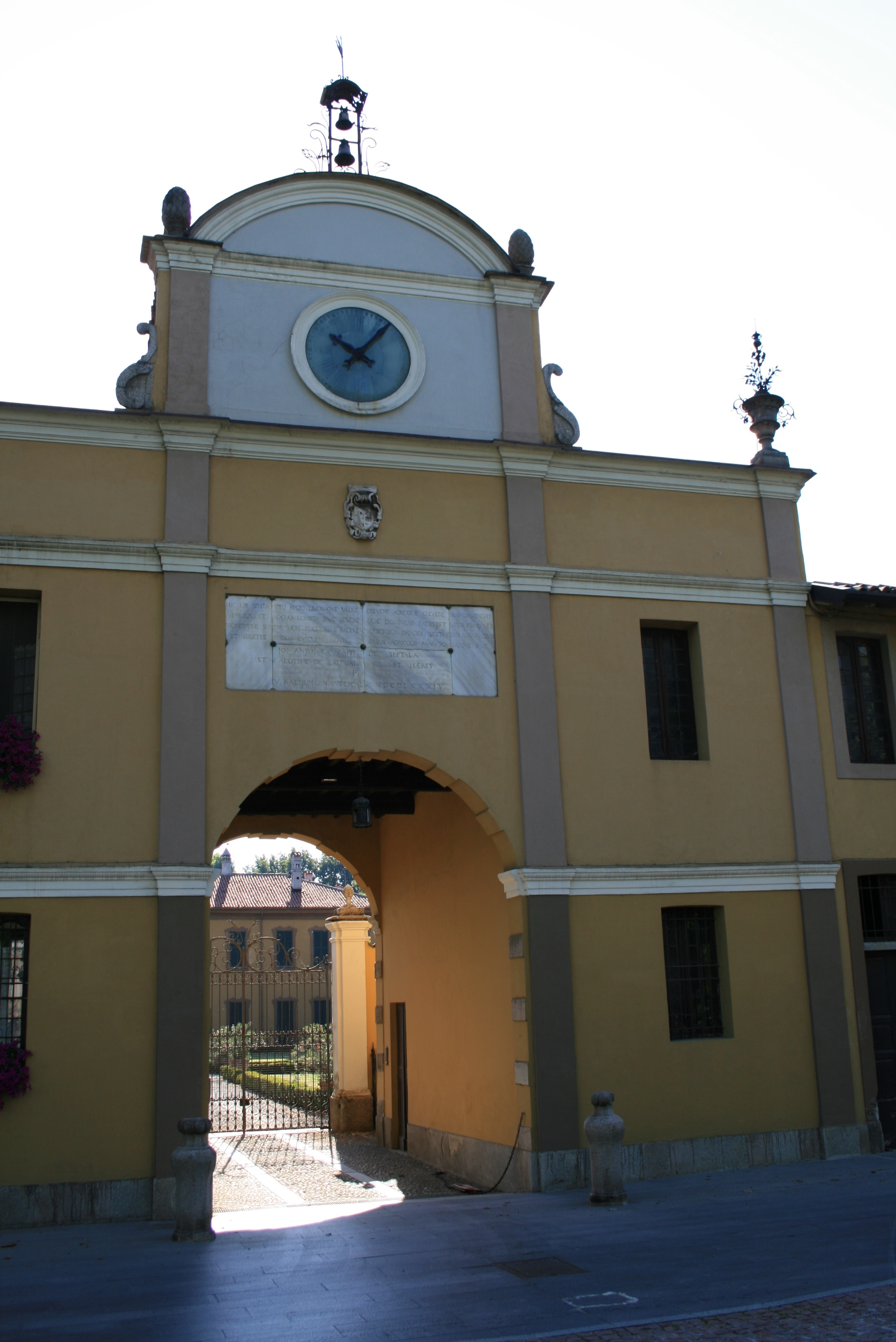 Arese Ingresso di Villa Ricotti La Valera